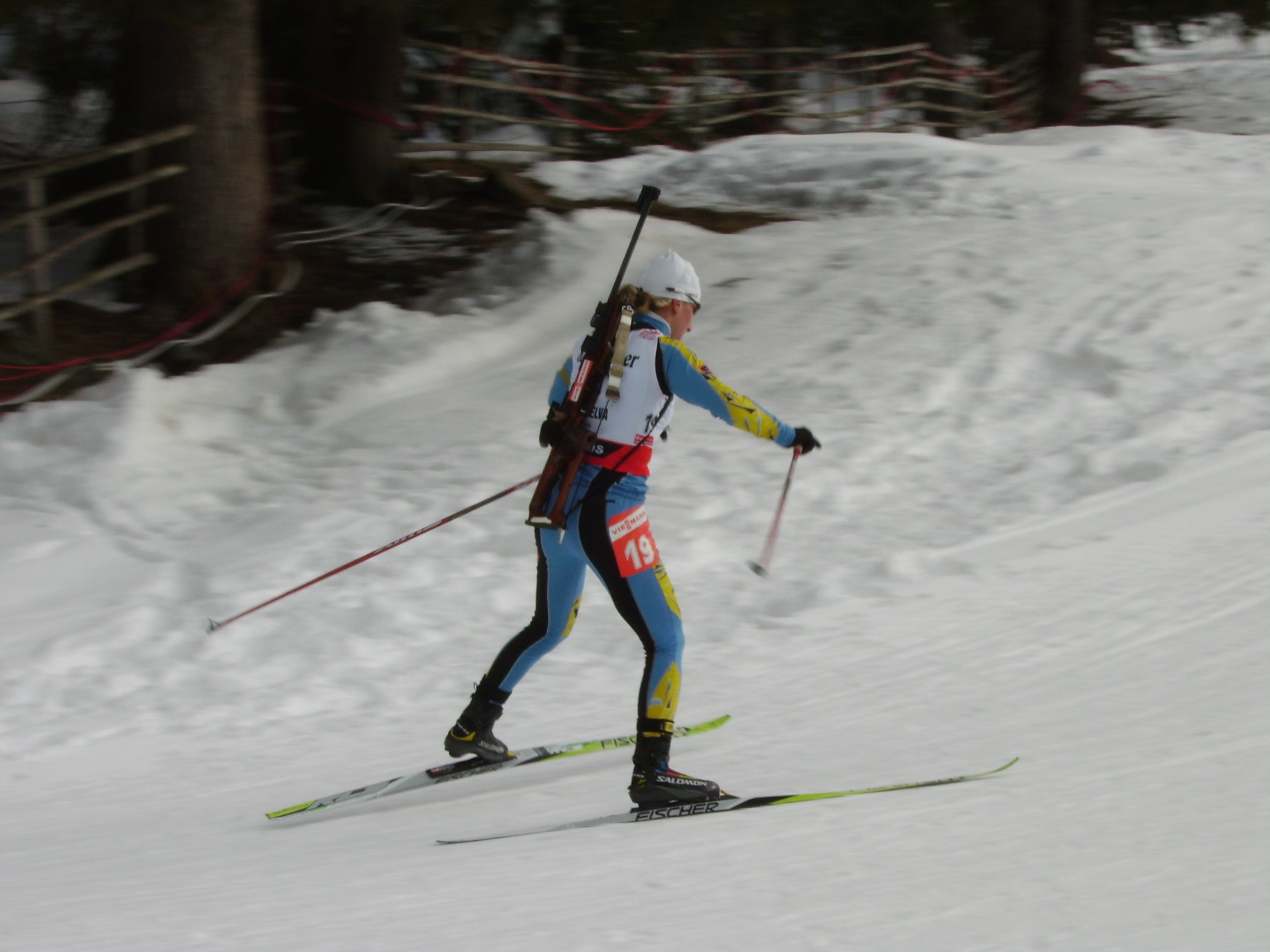 Vita Semerenko (UKR) nella partenza in linea ai Mondiali di biathlon del 2007 ad Anterselva